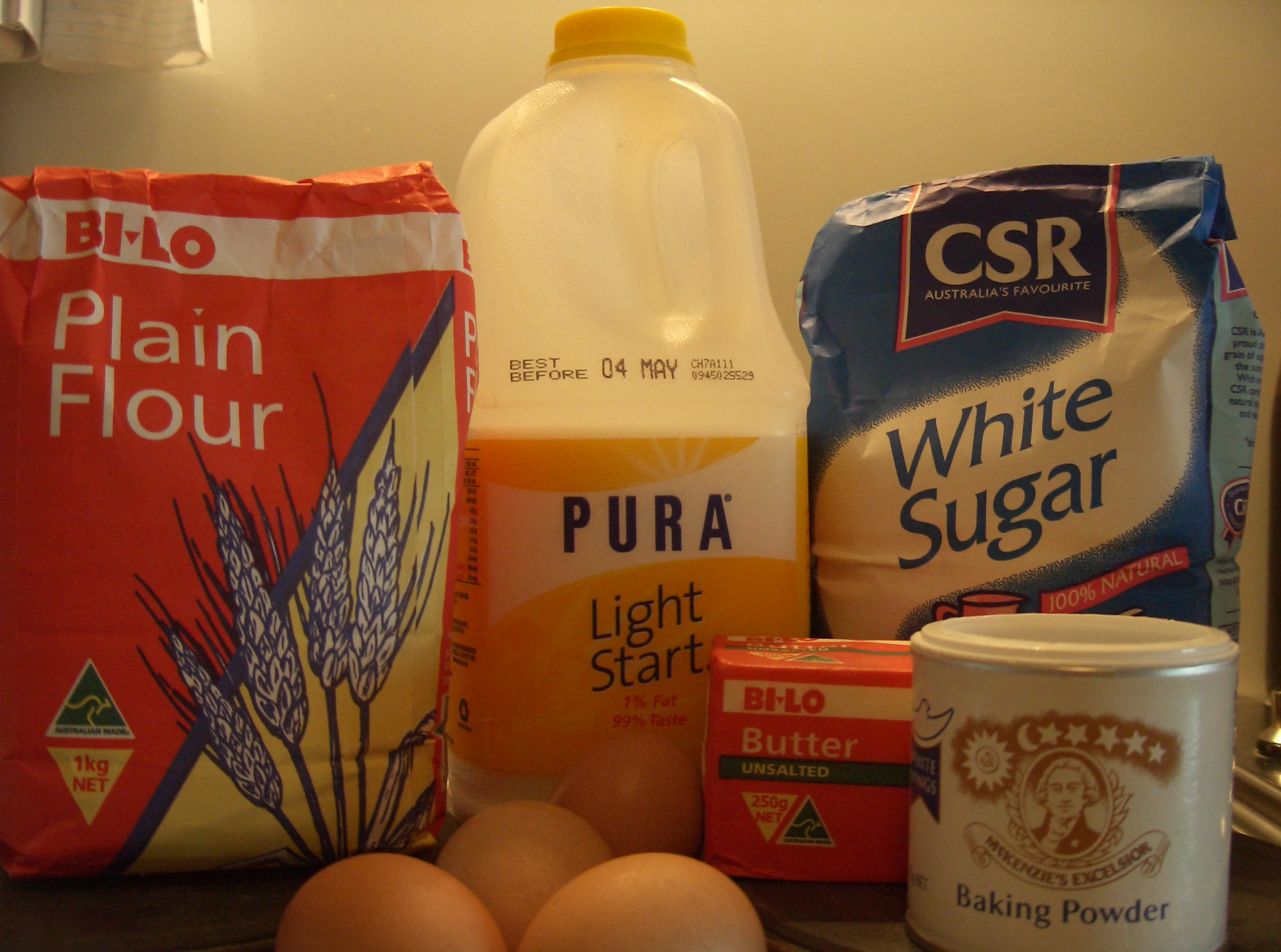 Ingredients for Cookbook:1-2-3-4 Cake. From left: Plain flour, eggs, milk, butter, sugar, baking powder.